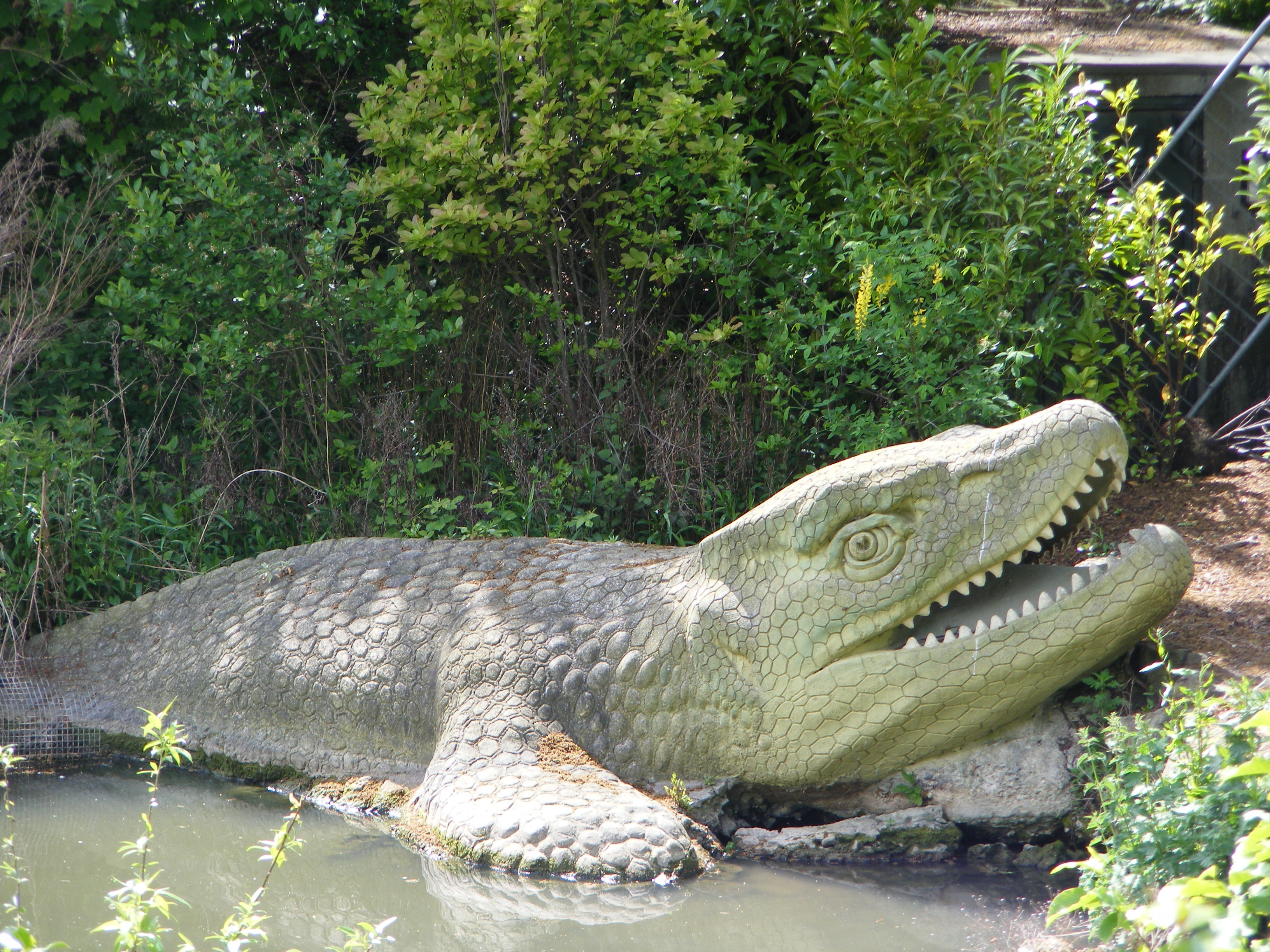 Dinosaur